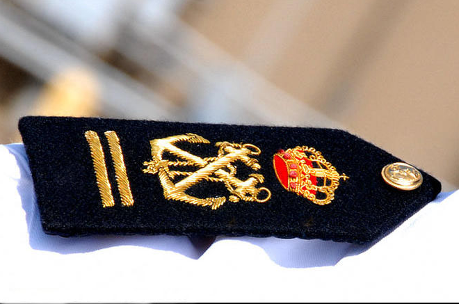 Pala de Guardiamarina de 2º de la Escuela Naval Militar (España)